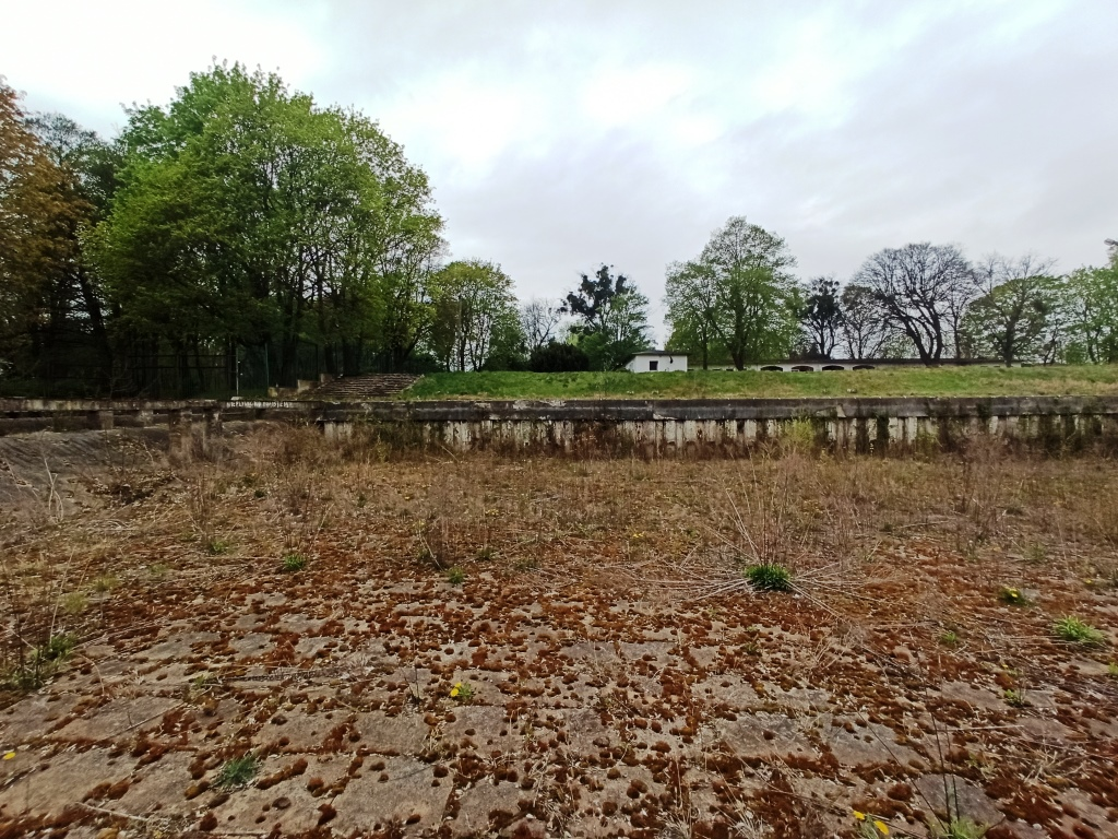 Elbląg basen odkryty 1934, ruina rok 2020